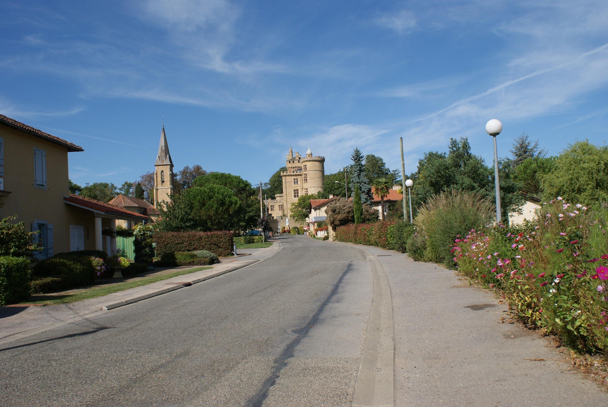 Saint-Blancard (Gers, Frankrijk) : De D228.